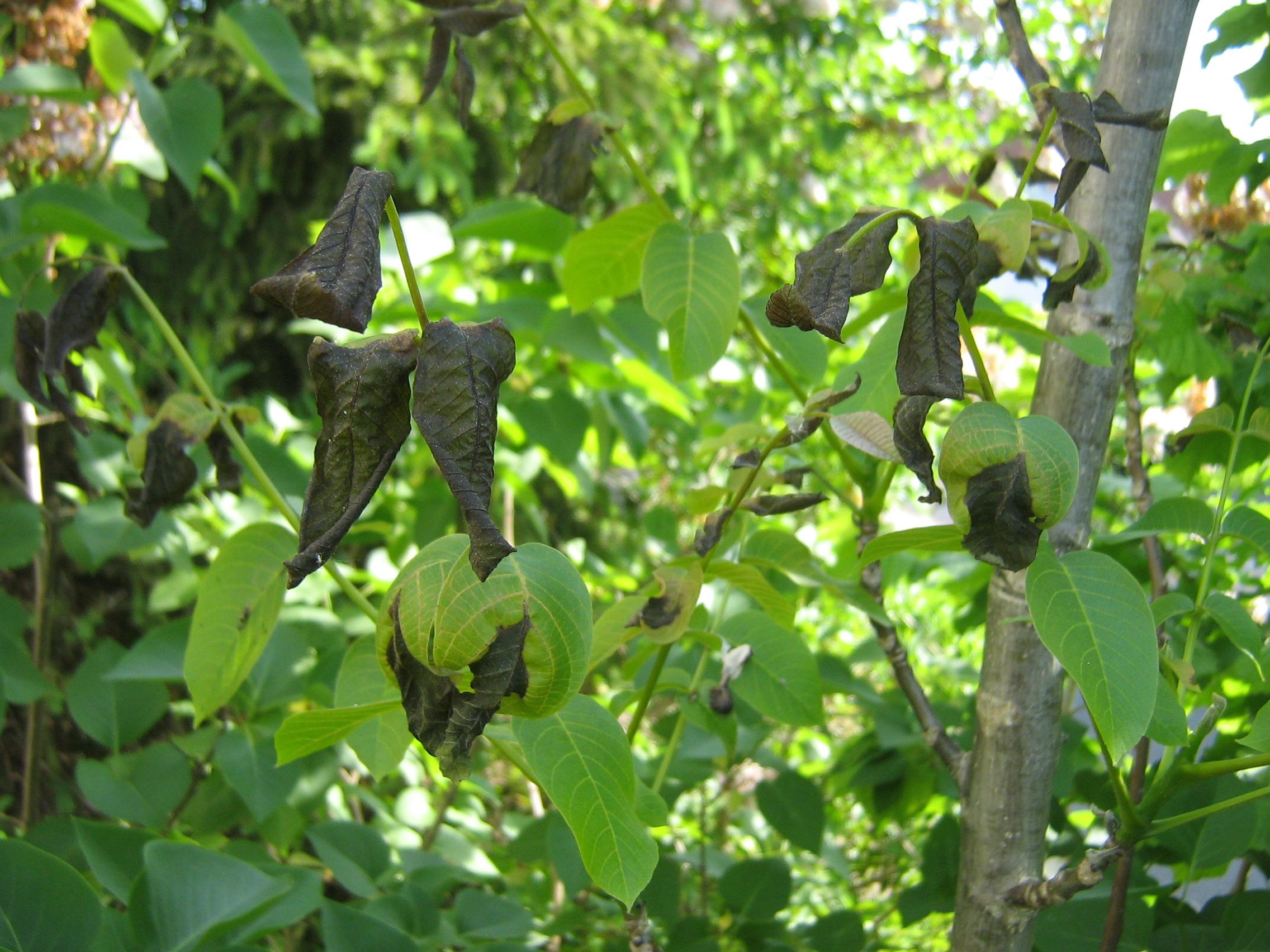 Frostschäden durch Nachtfröste an Walnussbäumen, aufgetreten Anfang Mai 2011